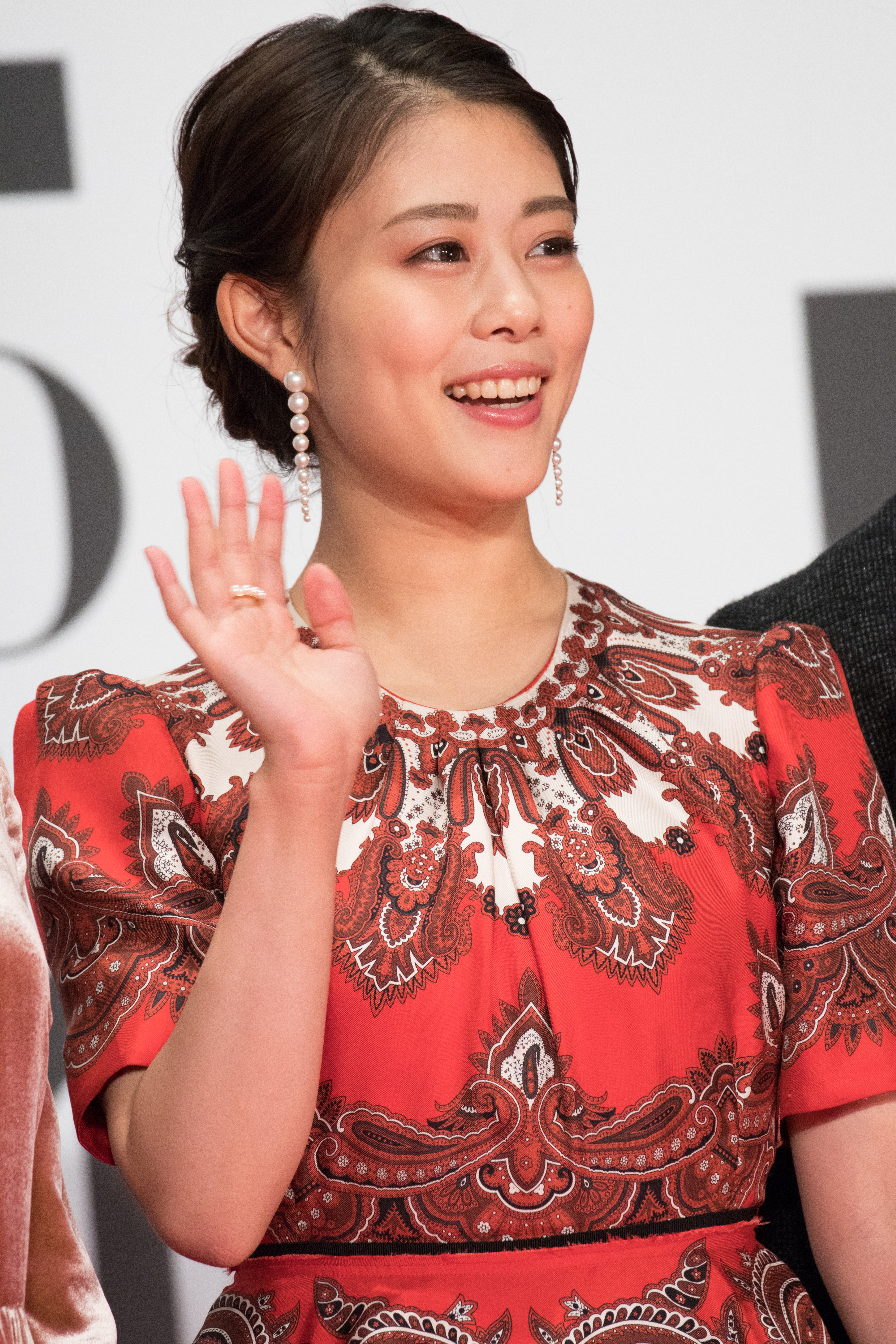 第29回 東京国際映画祭 オープニングセレモニー 高畑充希 (アズミ・ハルコは行方不明)